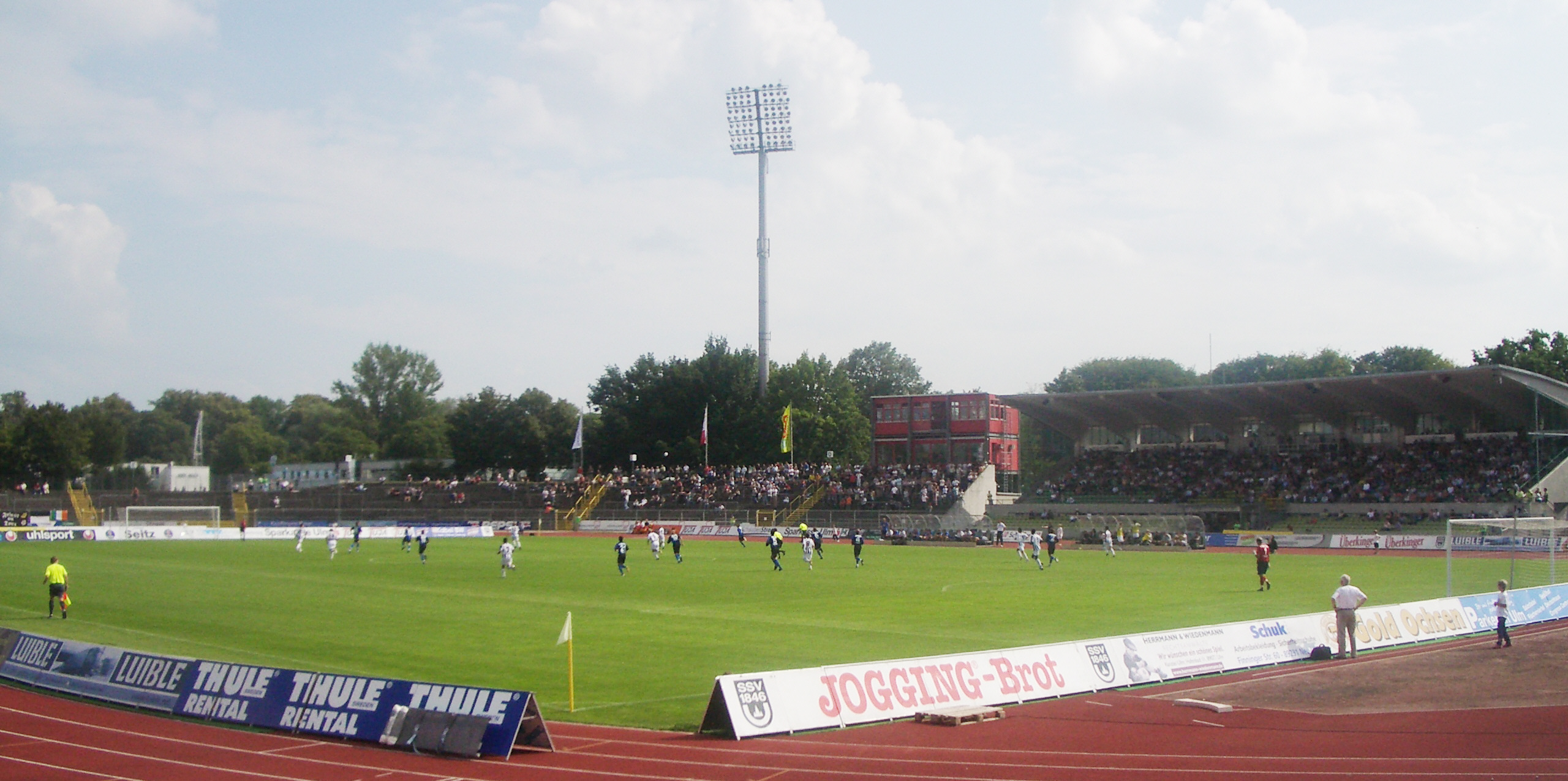 Donaustadion Ulm (SSV Ulm - SV Waldhof Mannheim, 12 August 2007)